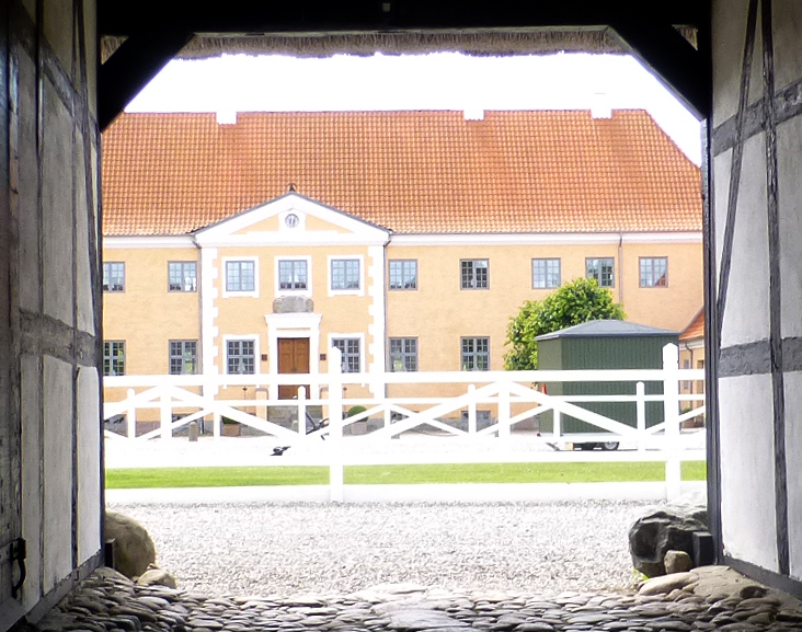 Lyngsbæk Hovedgaard set gennem porten